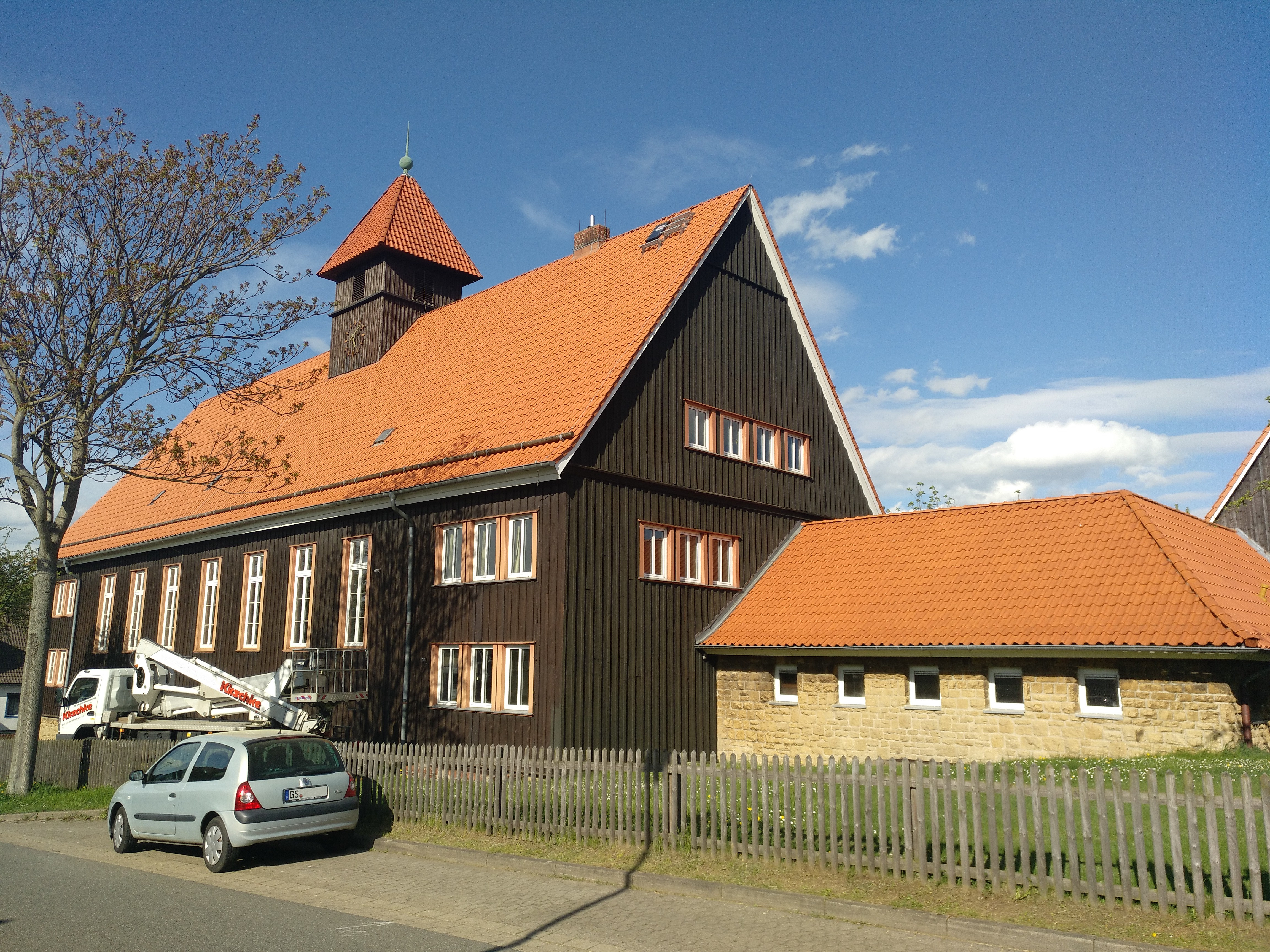 Dorfgemeinschaftshaus in Göttingerode, Südwestblick.